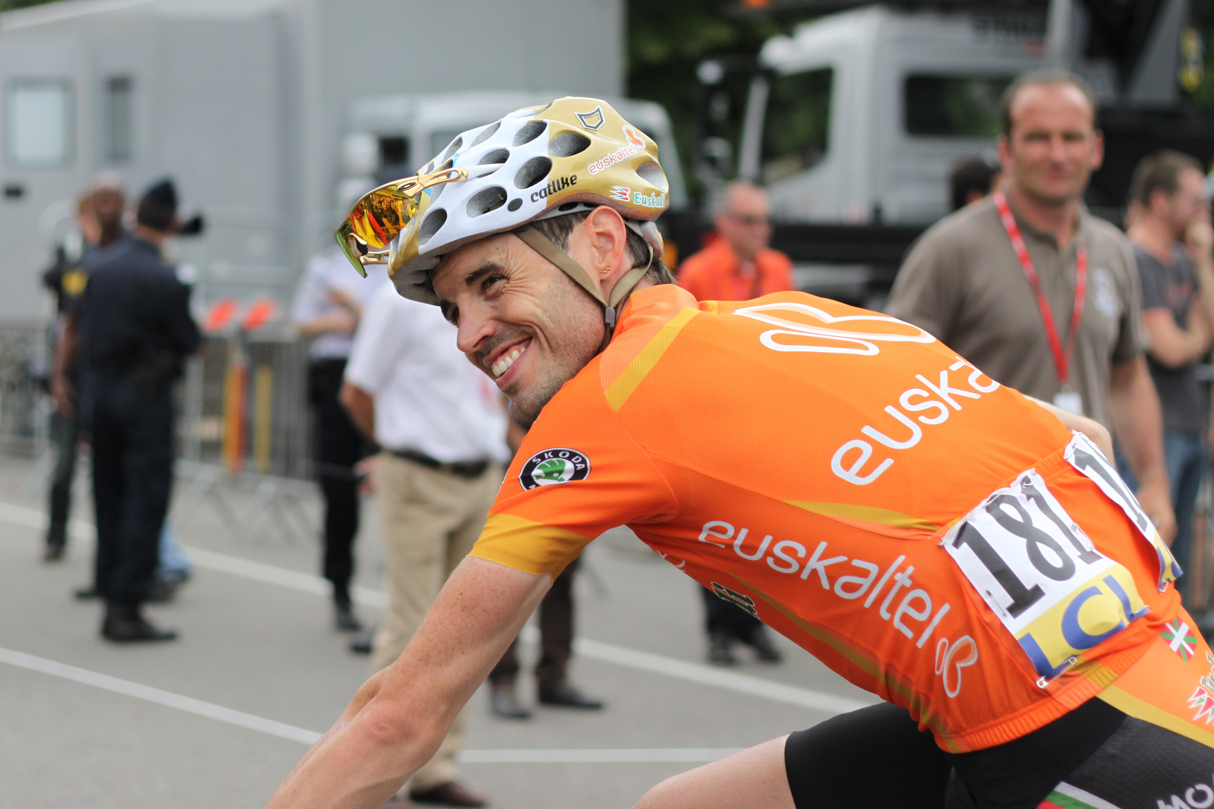 Samuel Sánchez à son arrivée à Grenoble après la 5e étape du Critérium du Dauphiné 2010